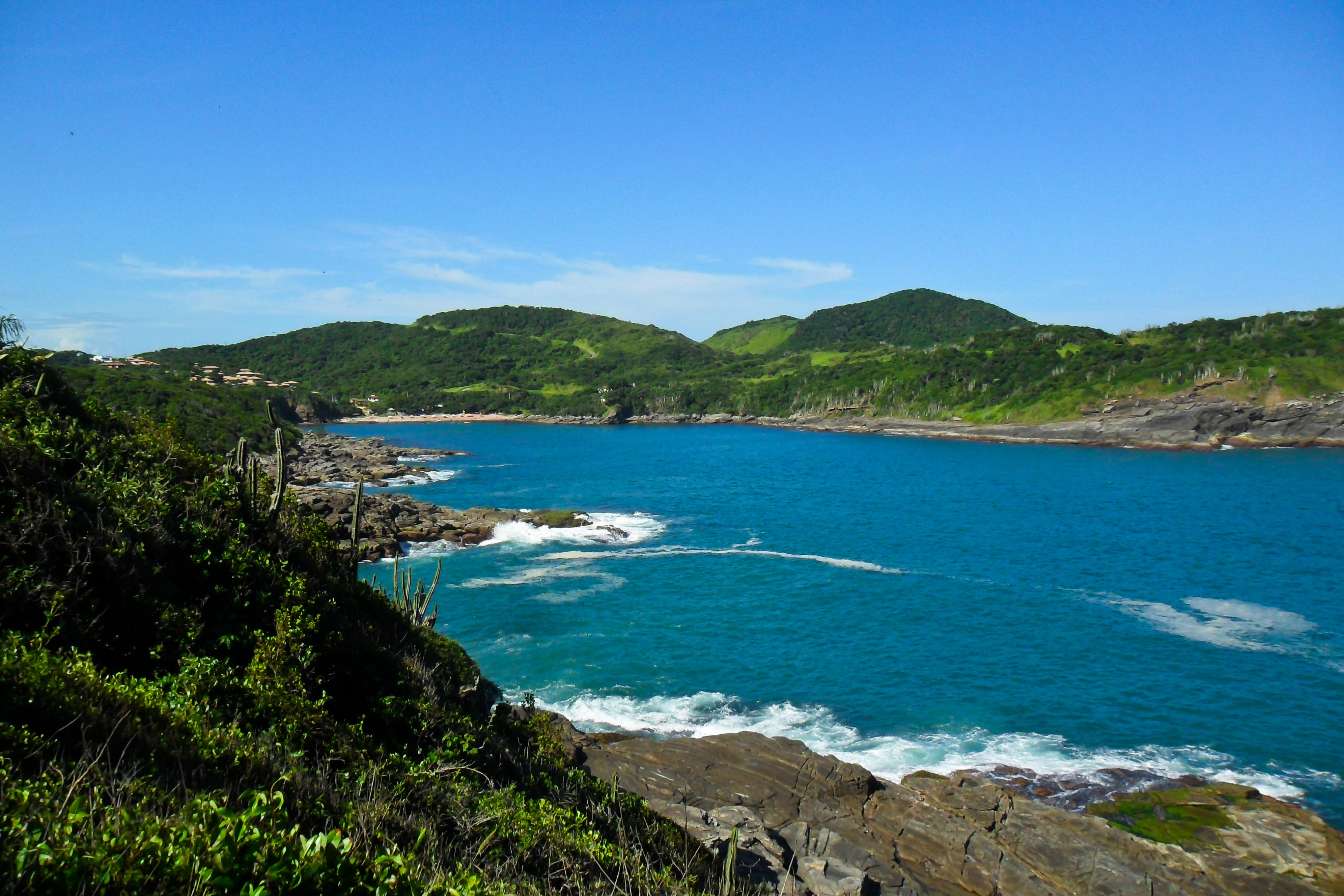 Descrição_para_sua_foto